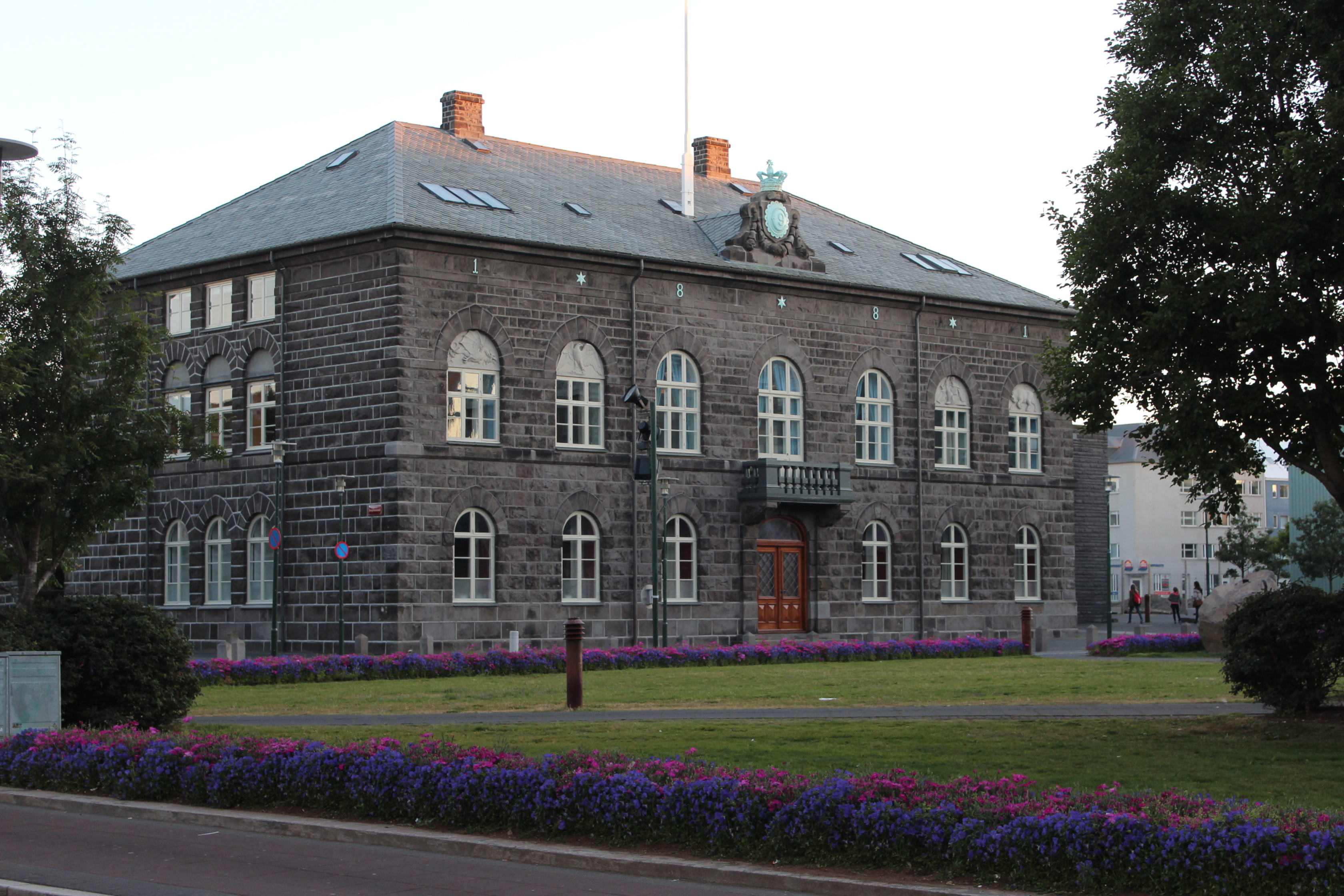 D'Gebai vum Alþingi, dem islännesche Parlament.